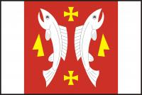 Karlovice (ZL), vlajka